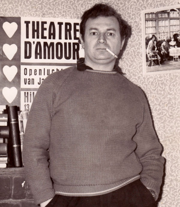 Naaijkens poseert bij een affiche van ‘Theatre d’Amour’ (1958).